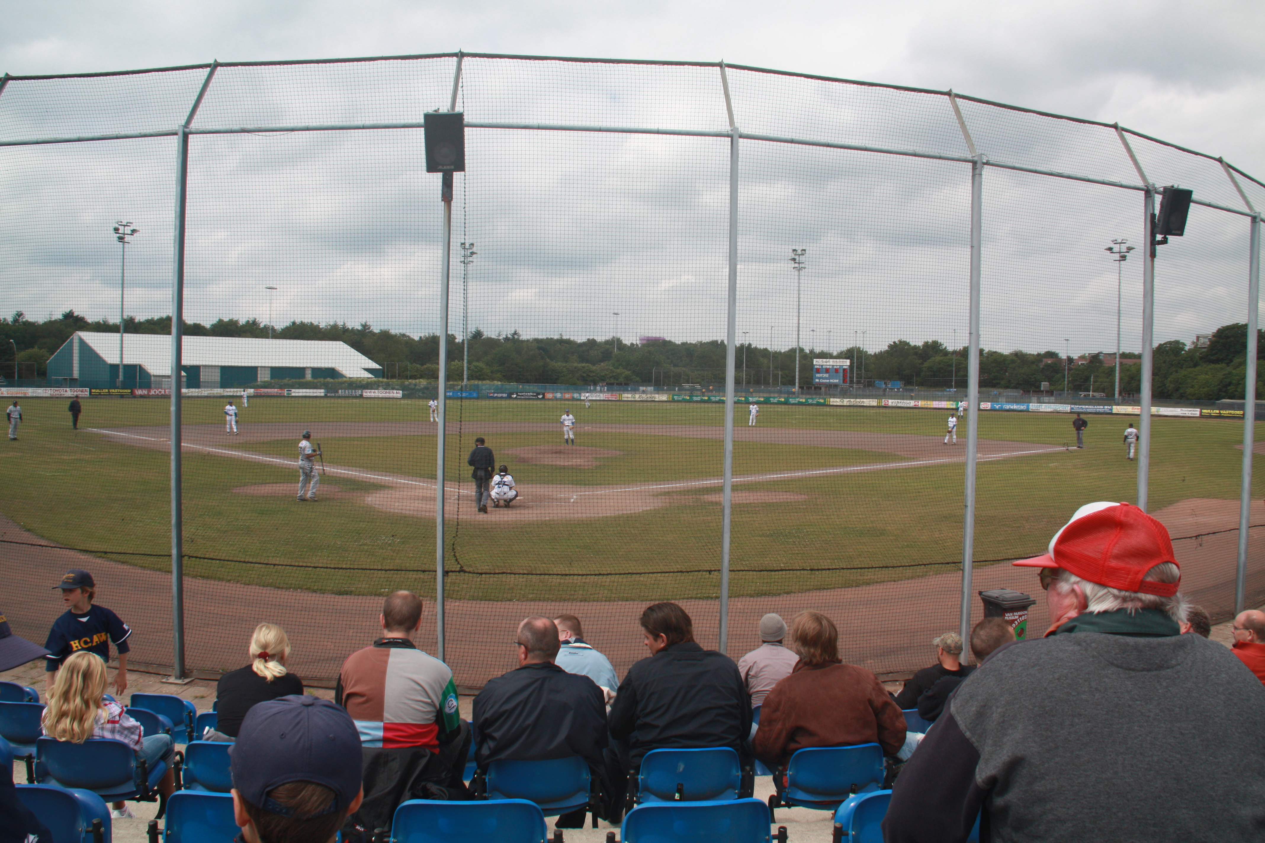 Honkbalwedstrijd tussen HCAW en Neptunus (honkbal) op 7 juni 2009